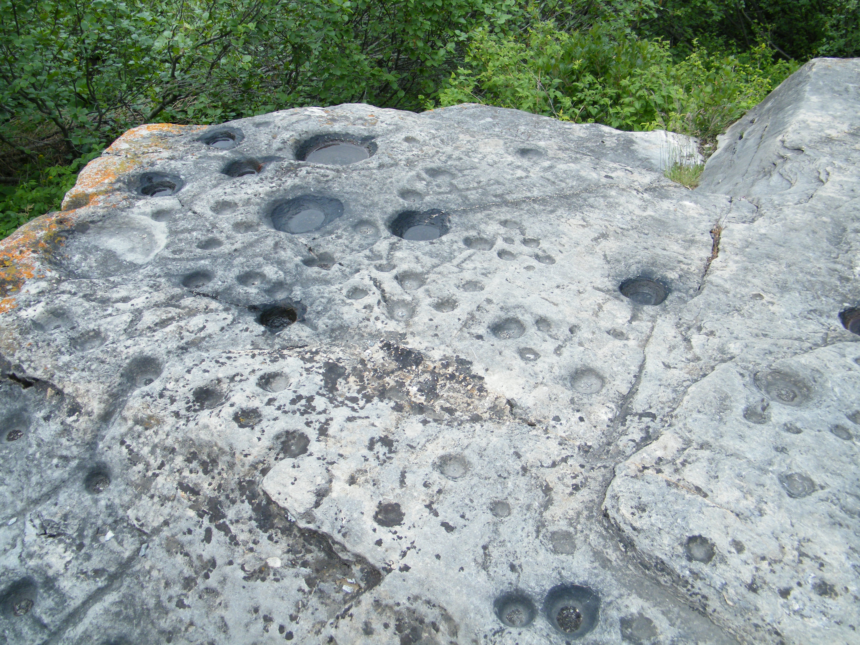 Pierre à cupules, dite Pierre de Chantelouve ou Pierre des Saints .